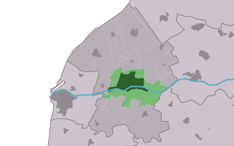 Kaartsje fan himrik fan Frjentsjer